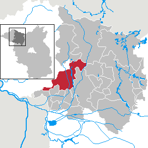 Kyritz in Brandenburg (Country) - District Ostprignitz-Ruppin